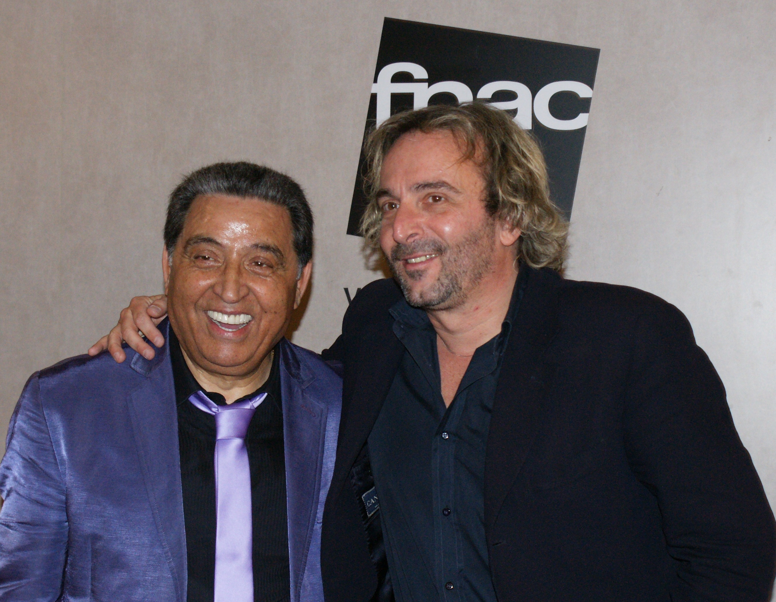 I cantanti Mario Trevi e Tony Tammaro in occasione della presentazione del disco Napoli Turbo Folk, alla Fnac di Napoli, il 6 maggio 2011. (sono l'autore della fotografia)